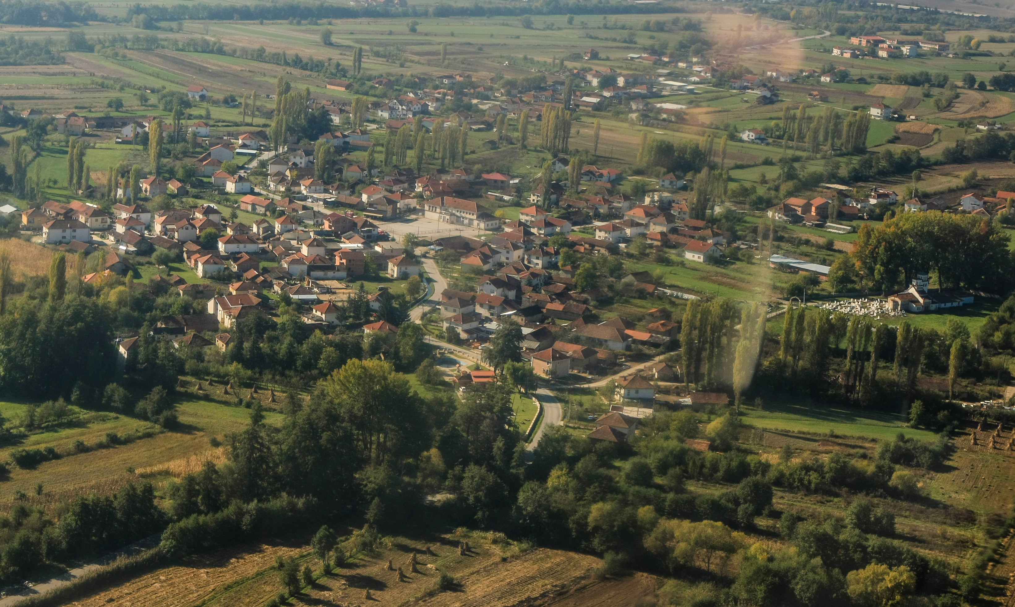 Фотографија на Драслајца од хелихоптер